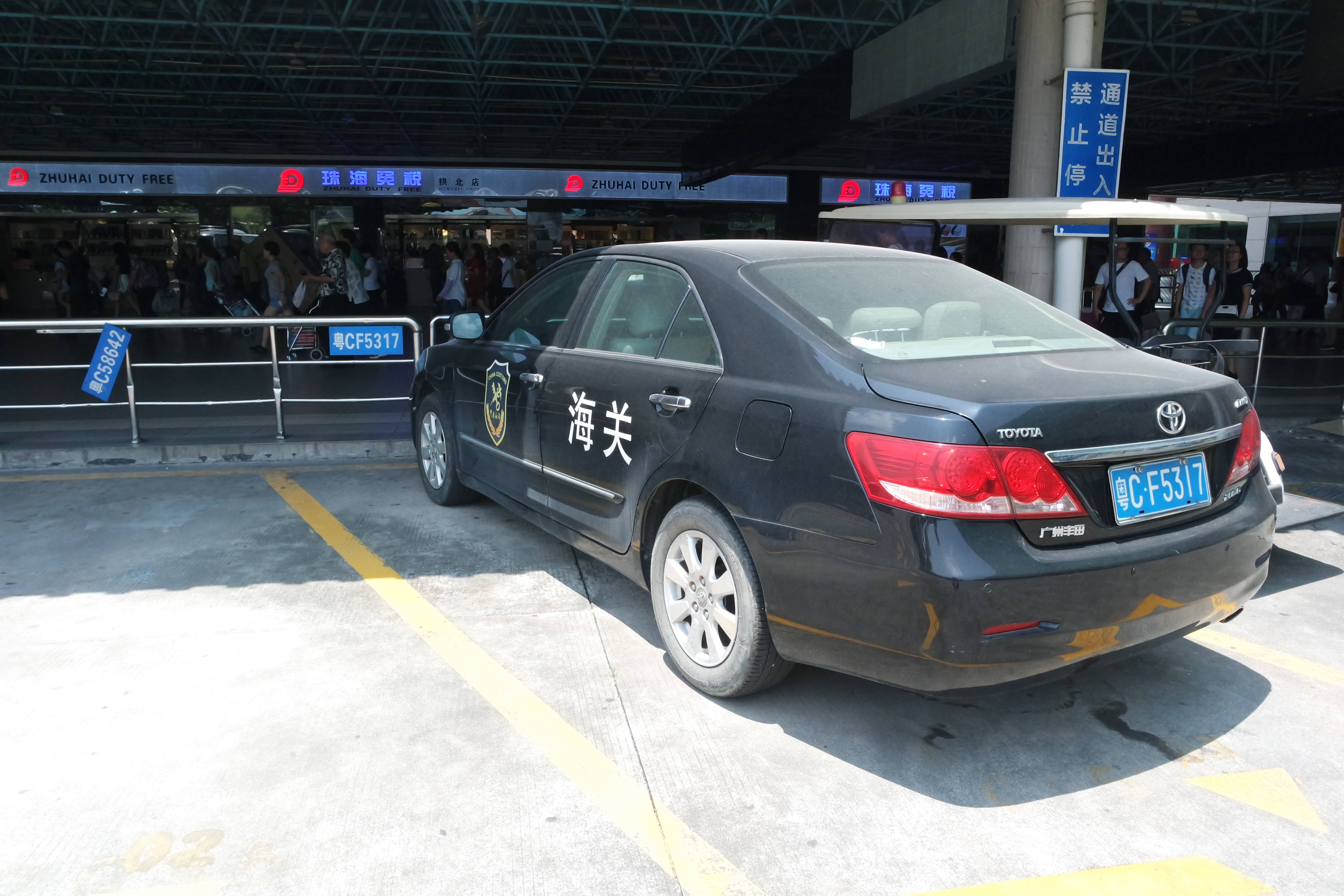 中文（中国大陆）: 拍摄地点：中国广东省珠海市拱北口岸 单位：海关广东分署拱北海关 车牌号：粤CF5317